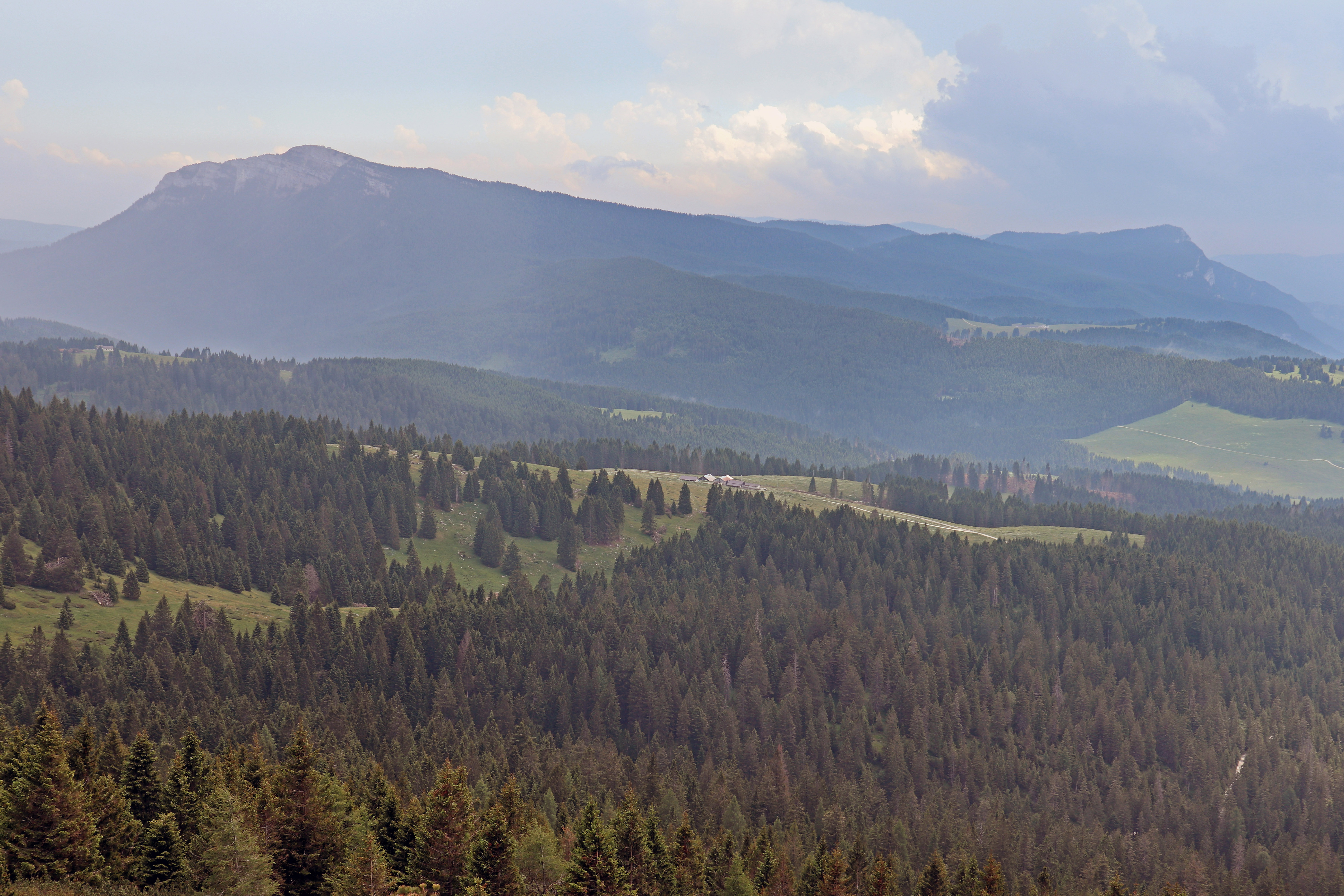 Blick vom Gipfel der Cima Vezzena in Richtung der Ex-Forts Monte Verena (links) und Campolongo (rechts). Das Forte Campolongo befindet sich direkt über dem Val d'Astico.